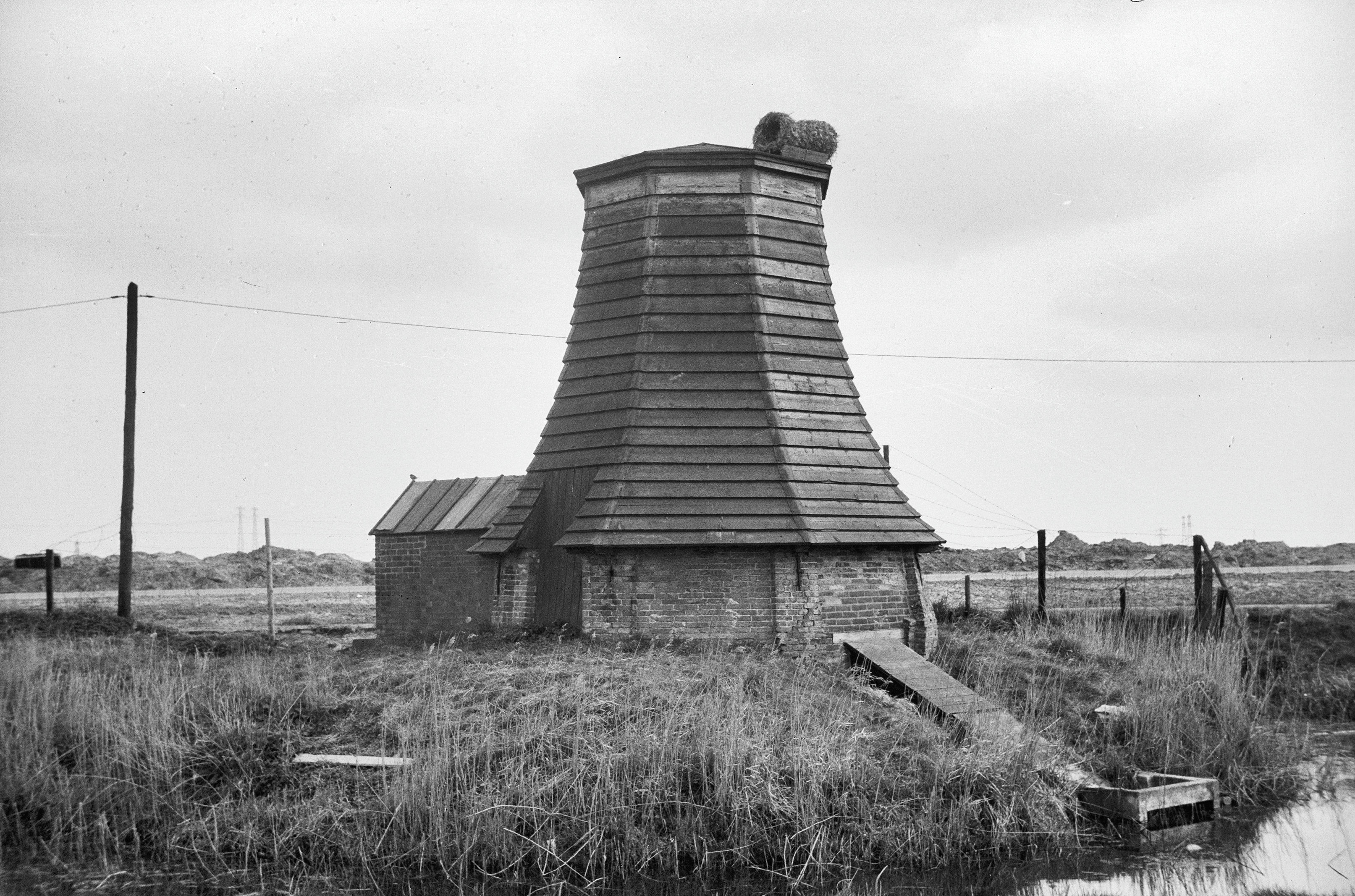 Molen van Boonstra's Polder: Romp van monniksmolen. Object location53° 11′ 36″ N, 5° 50′ 32″ E